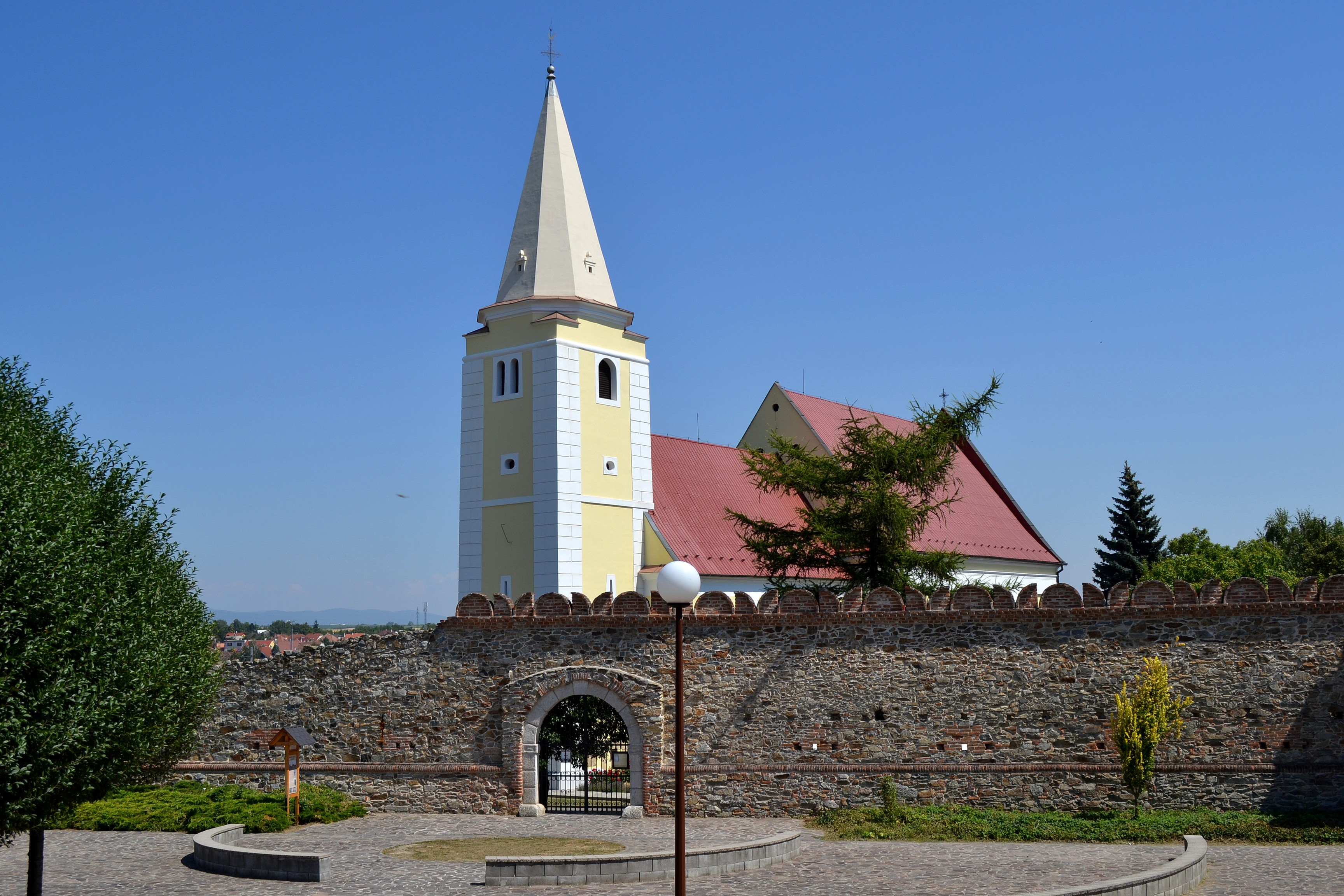 Šenkvice (okr. Pezinok), Kostol svätej Anny